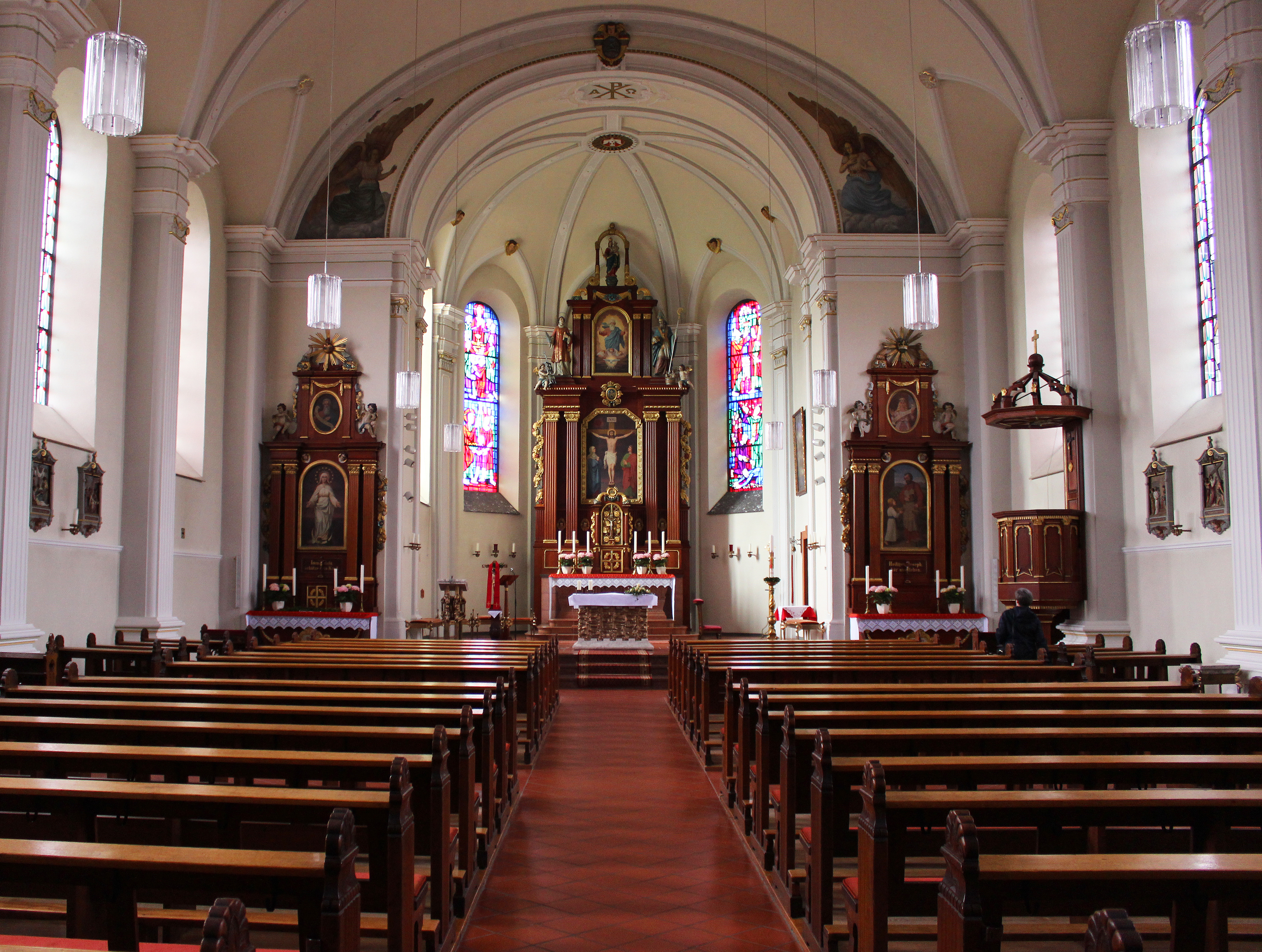 Blick ins Innere der katholischen Pfarrkirche St. Laurentius in Schwemlingen, einem Stadtteil von Merzig, Landkreis Merzig-Wadern, Saarland.